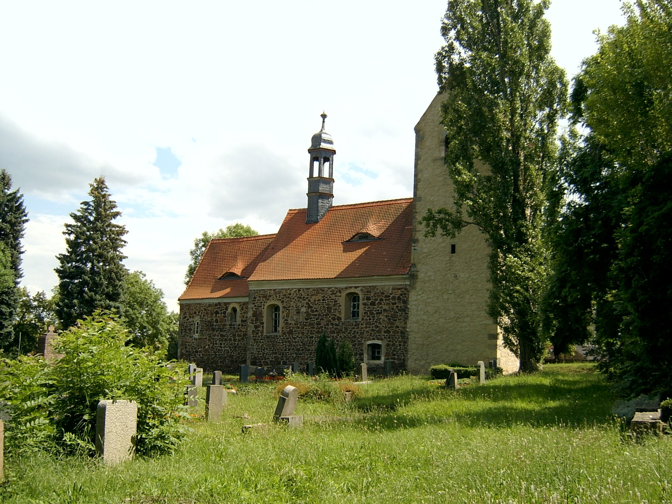 Kirche St. Moritz in Teicha.